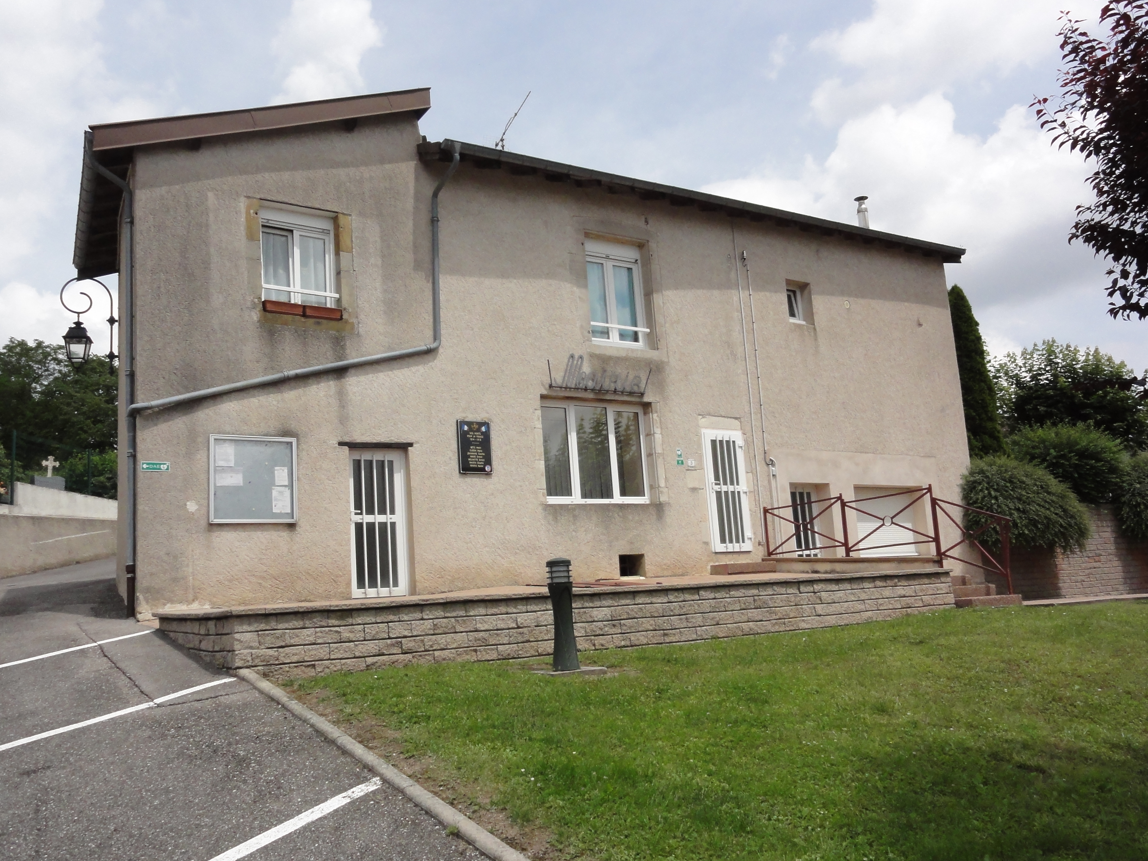 Haigneville (M-et-M) mairie